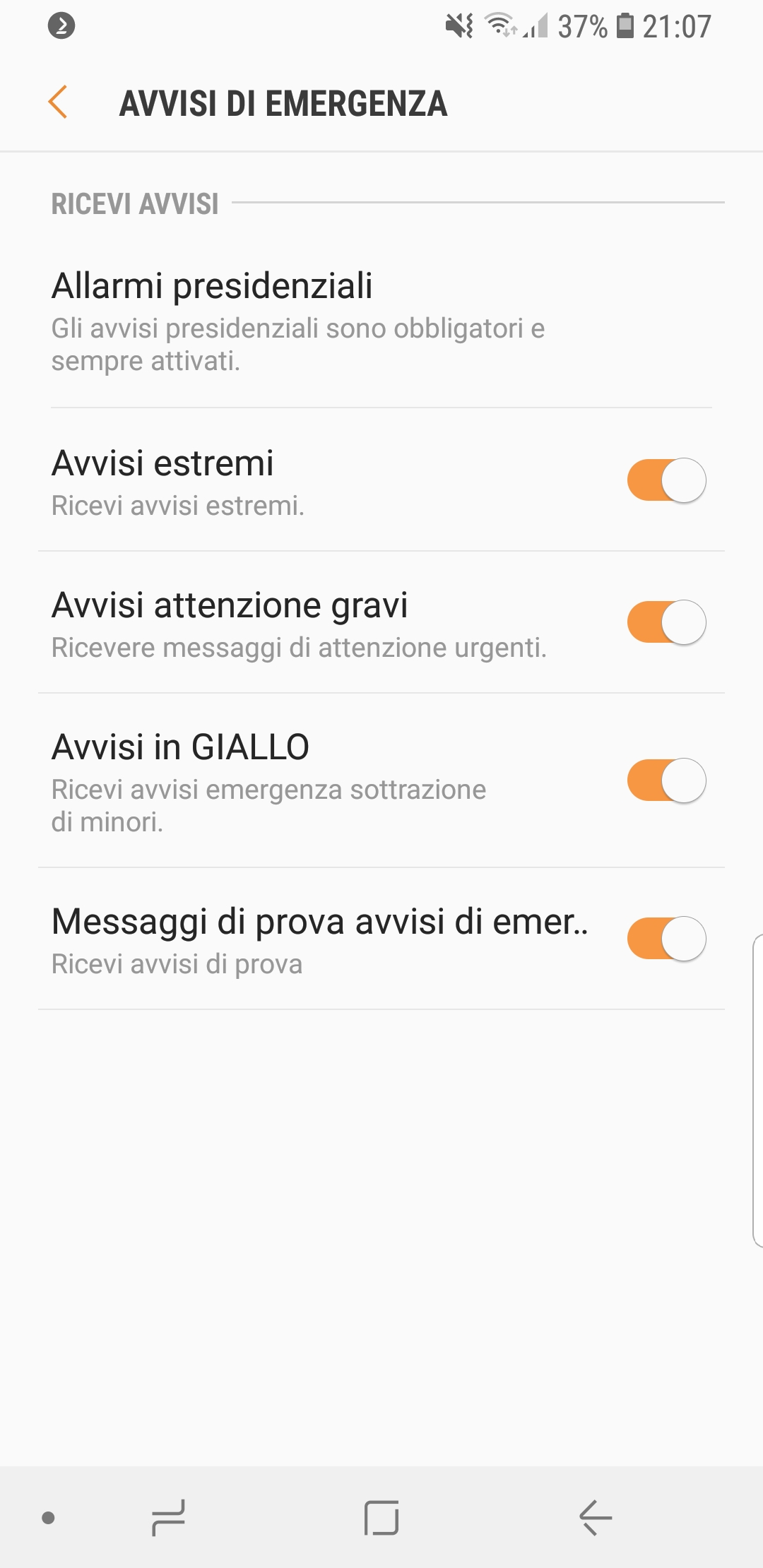 Cell Broadcast Italiano